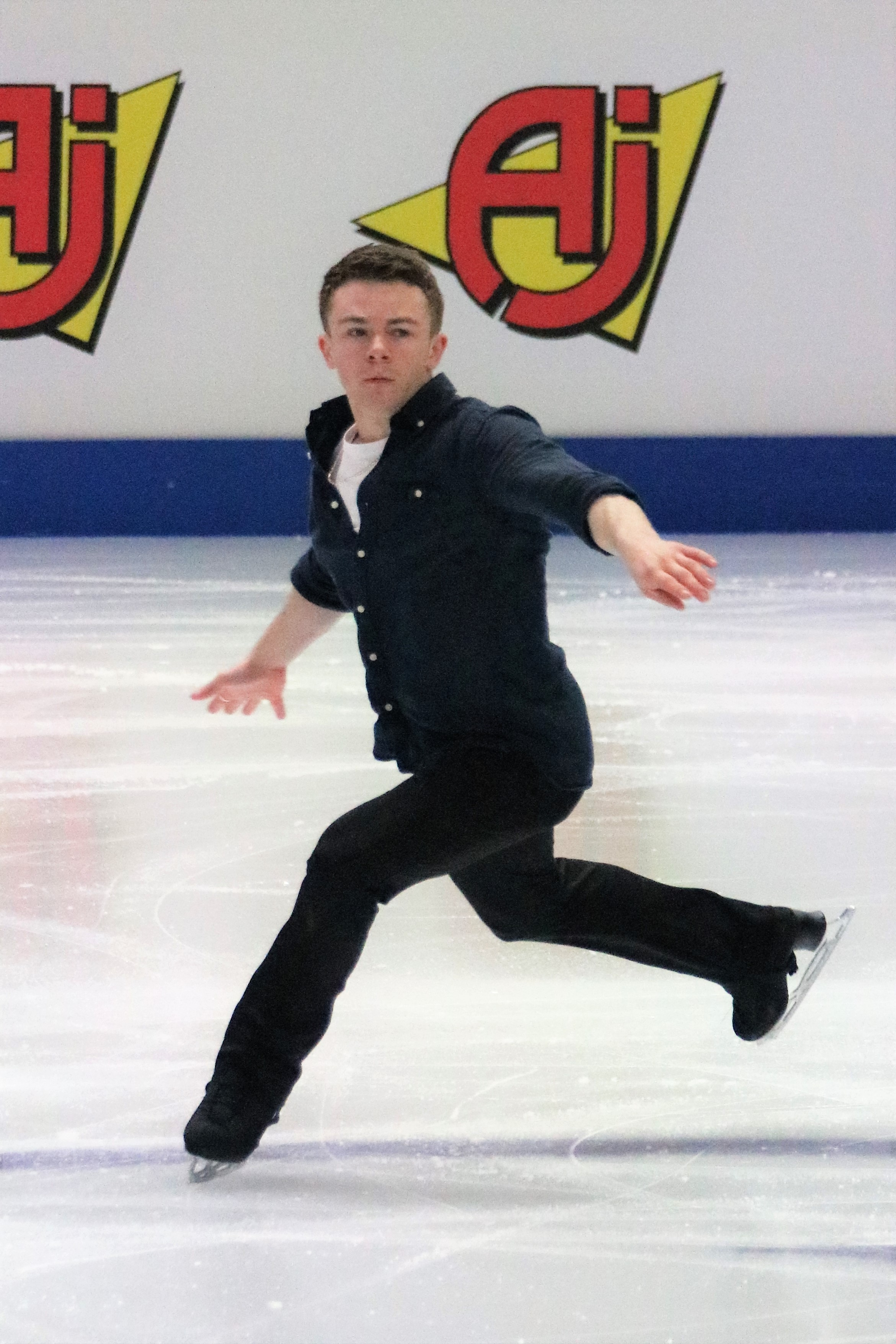 Питер Джеймс Холлан (Великобритания) на чемпионате Европы по фигурному катанию 2020